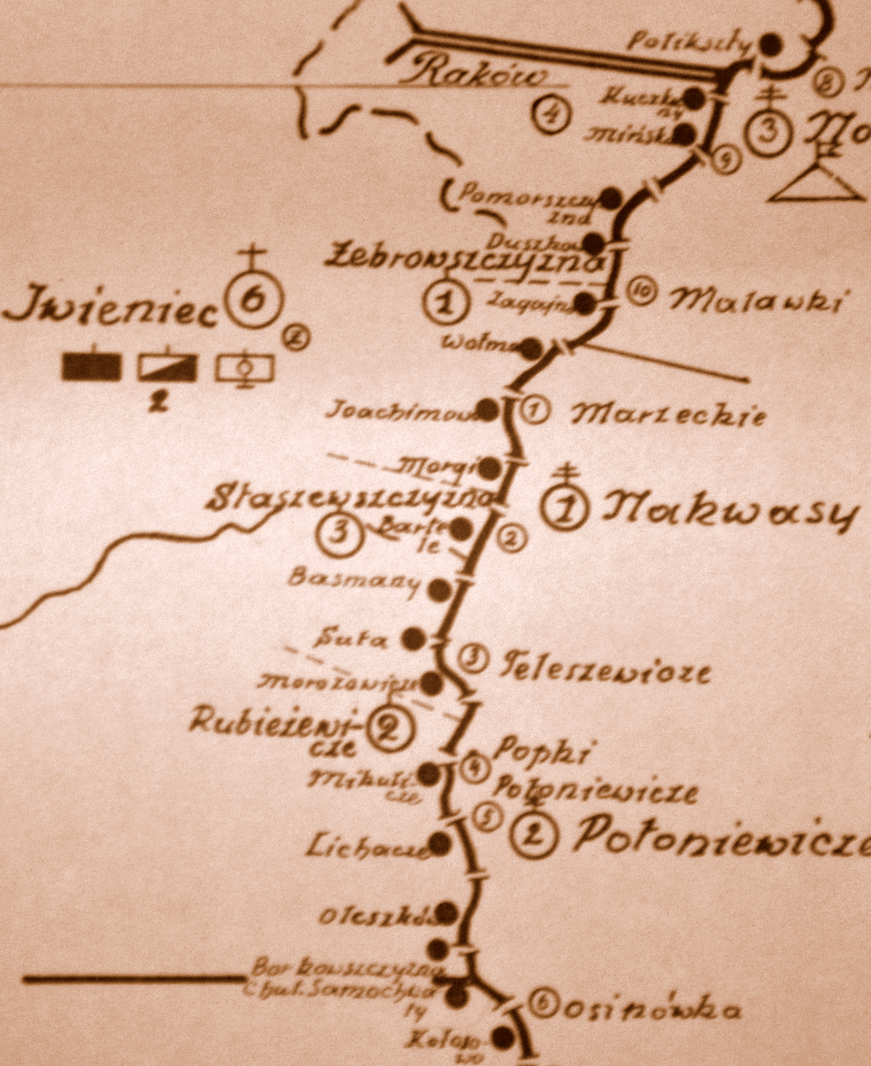 Szkic rozmieszczenia batalionu KOP Iwieniec w 1931